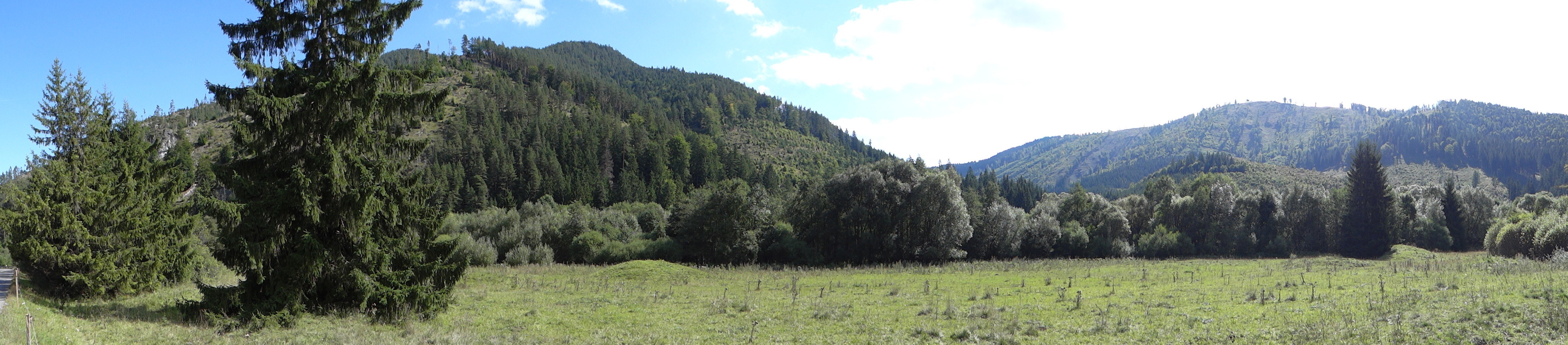 Skribňovo (dolina)